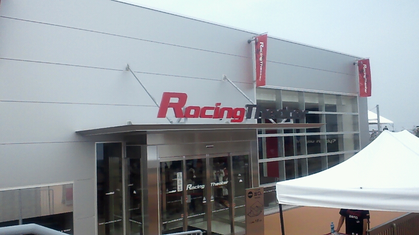 鈴鹿サーキット場内の新アトラクションの写真